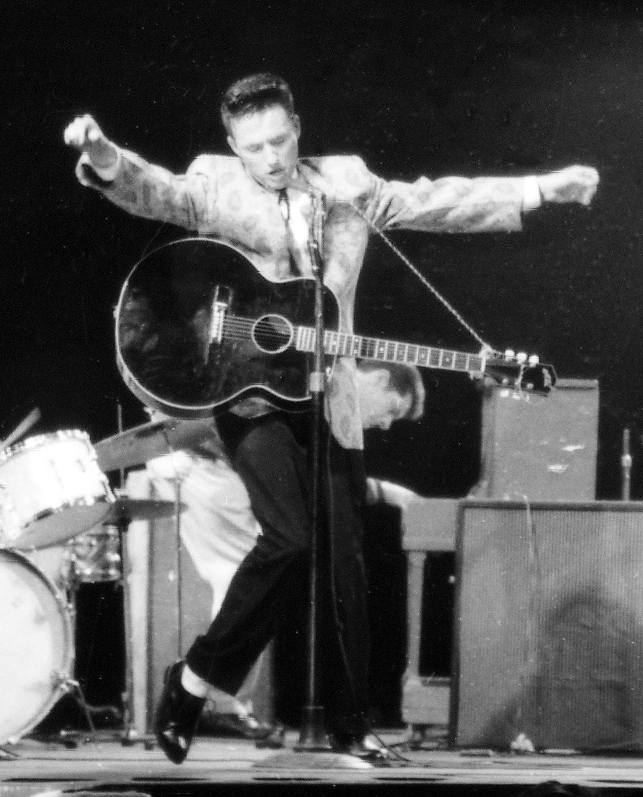 Lonnie Lee 1959 on stage